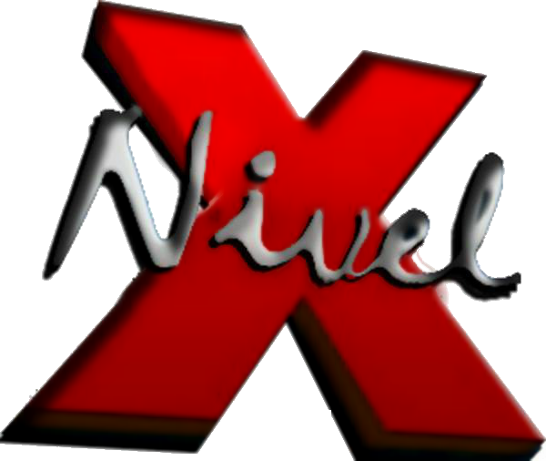 Logo del argentina programa de TV Nivel X, transmitido en Magic Kids